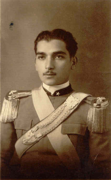 Immagine del capitano dottor Aldo Ratto in uniforme anni '40, fratello di Benvenuto Ratto.